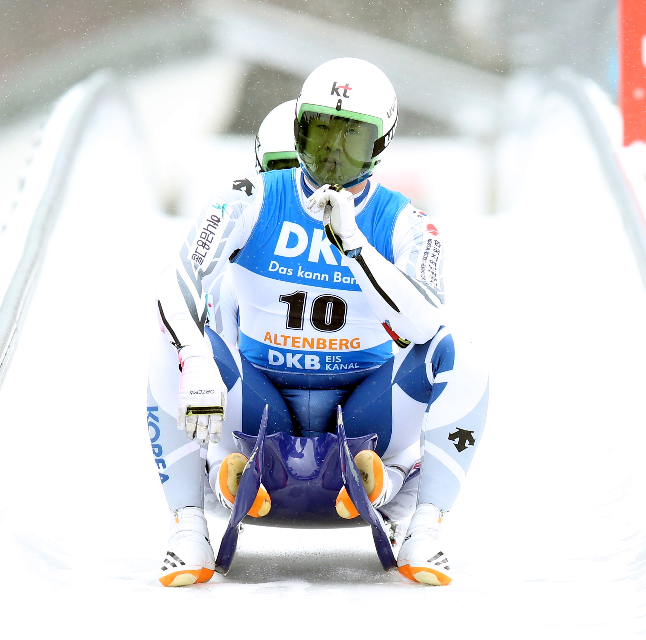 Jinyong Park und Jung Myung Cho beim Rennrodel-Nationencup der Doppelsitzer in Altenberg 2017